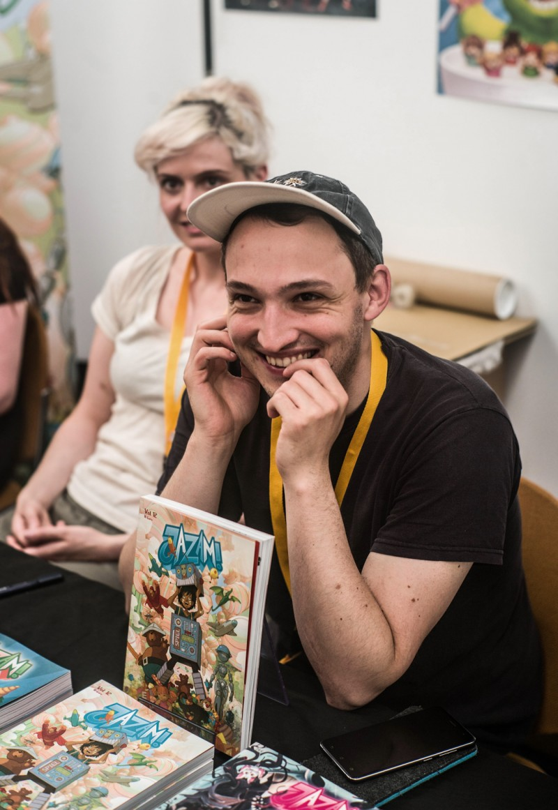 der deutsche Comicautor Jonathan Kunz